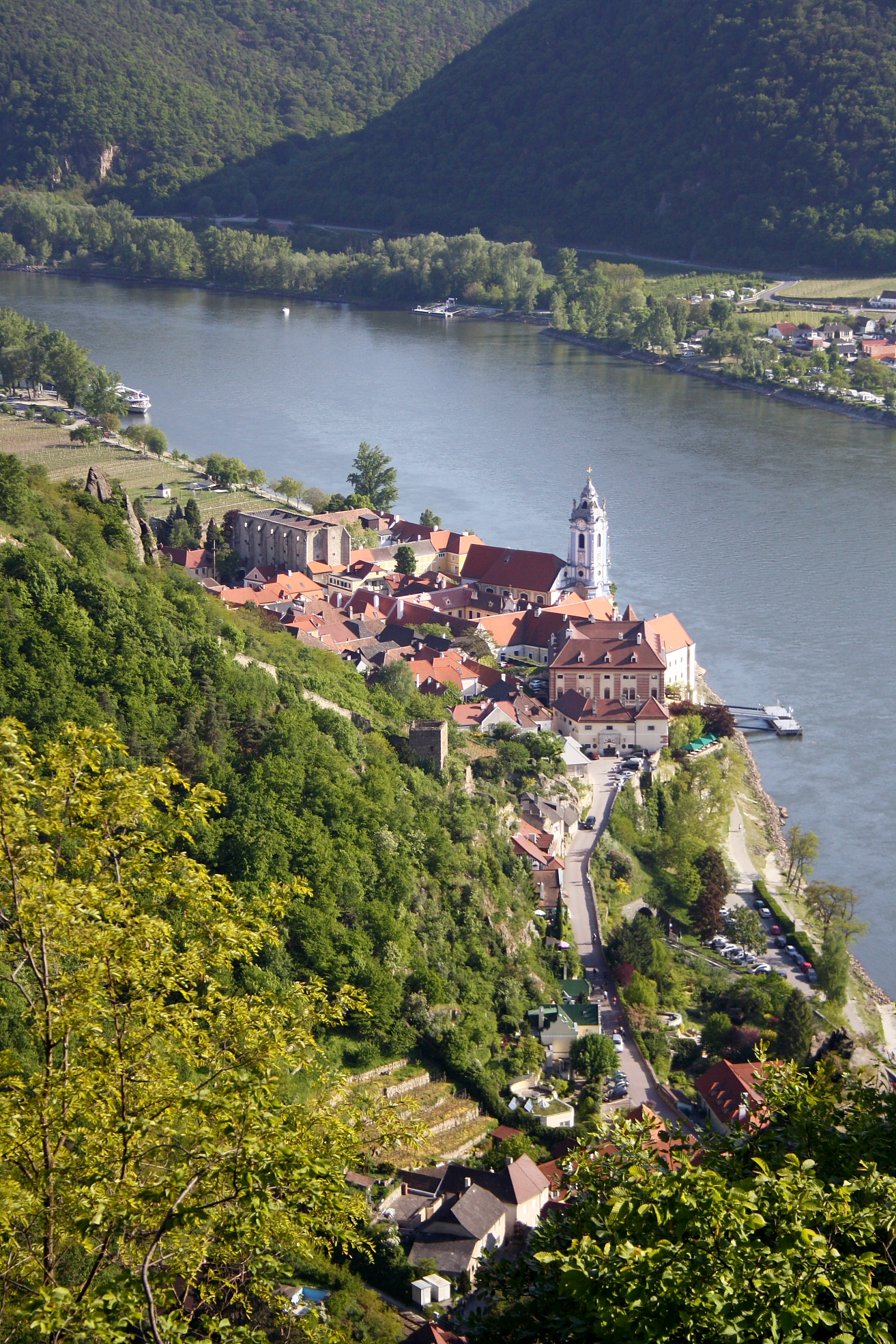 Blick auf Dürnstein vom Vogelbergsteig (Nordwestansicht).